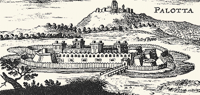 Várpalota (akkor csak Palota) vára középkori rézmetszeten